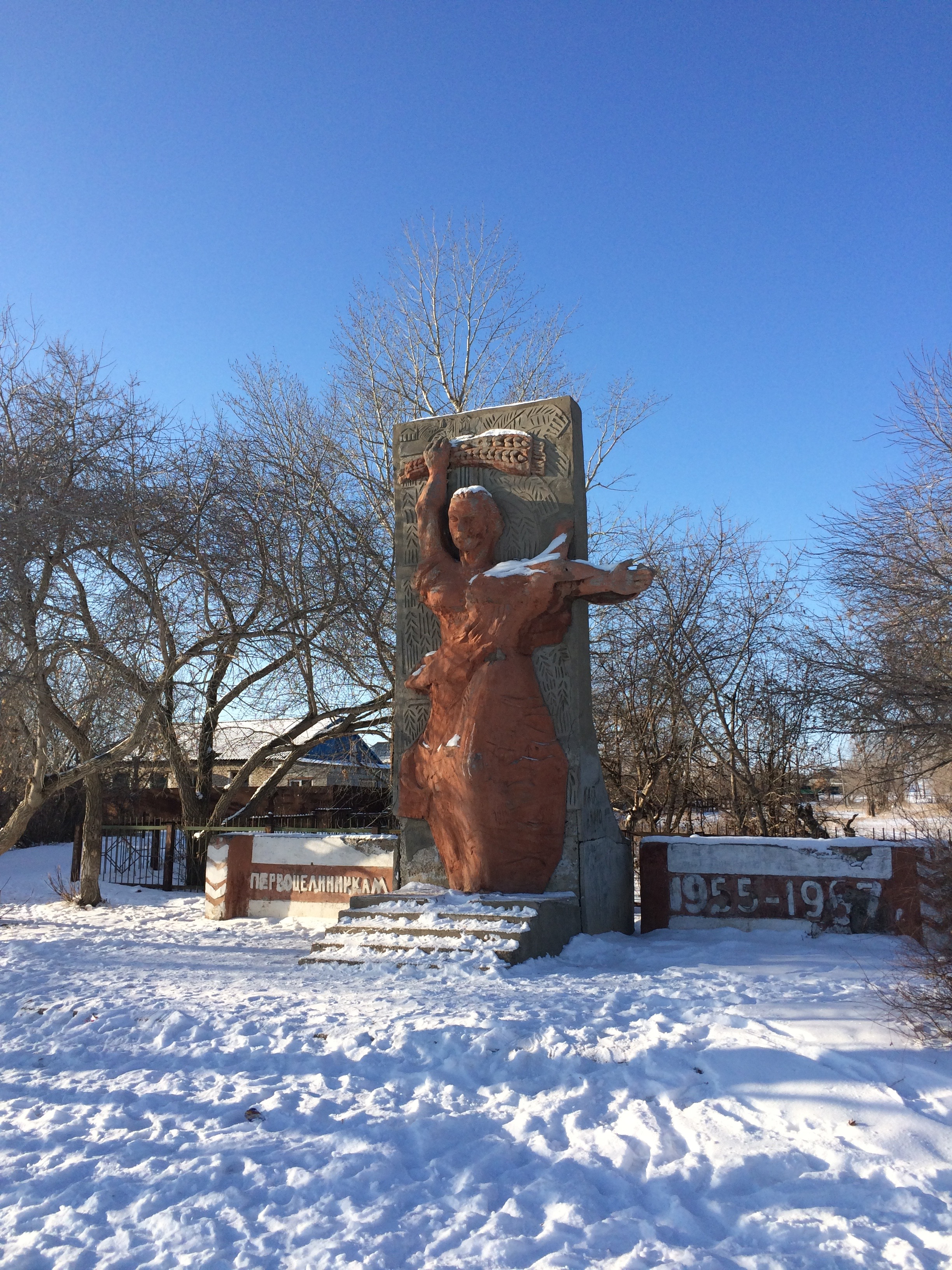 Памятник Первоцелинникам в селе Богданоквское Кизильский район Челябинская область